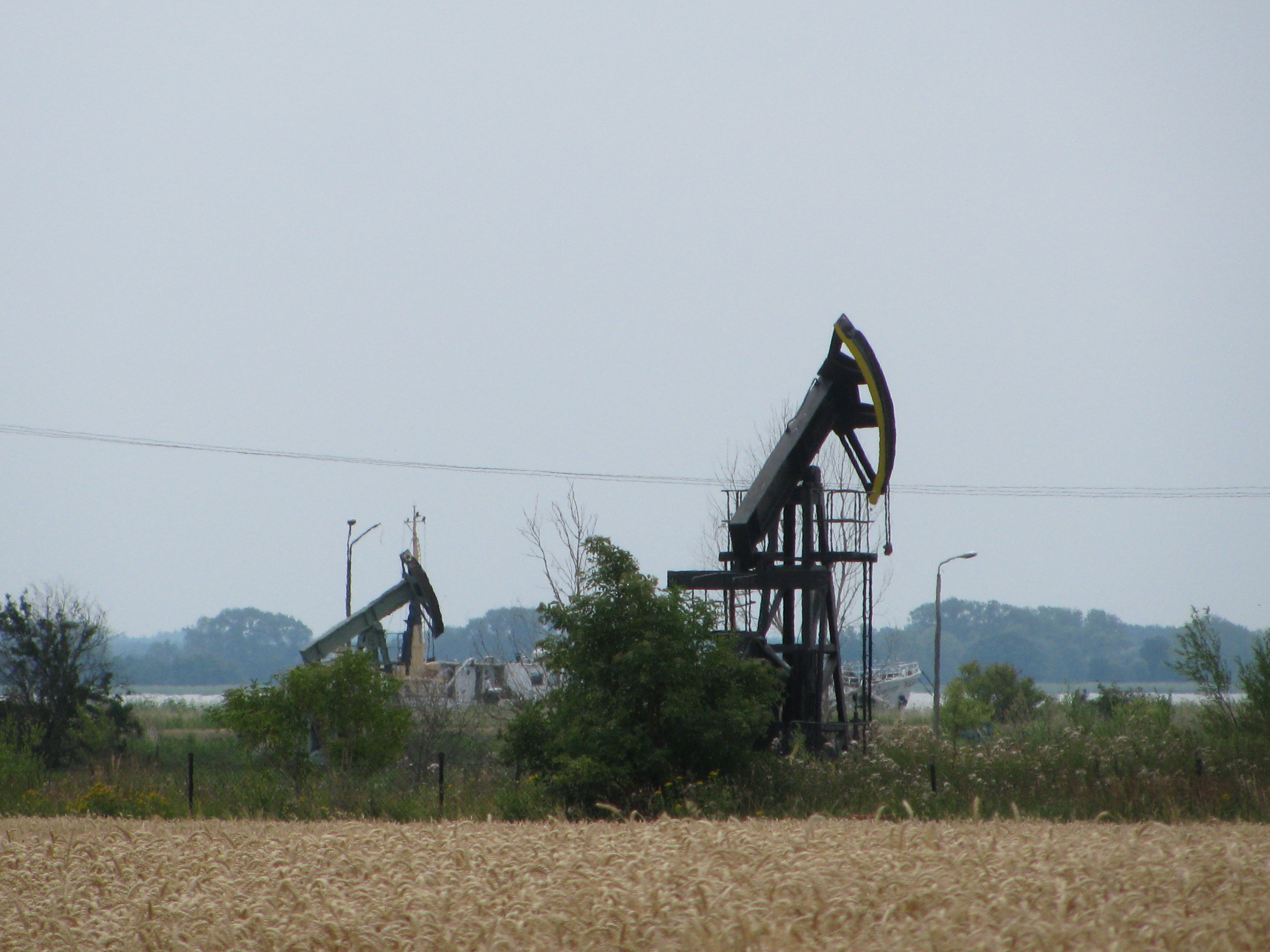 Pferdeköpfe am Netzelkower Hafen, Erdöl-Lagerstätte in der Gemeinde Lütow, Insel Usedom